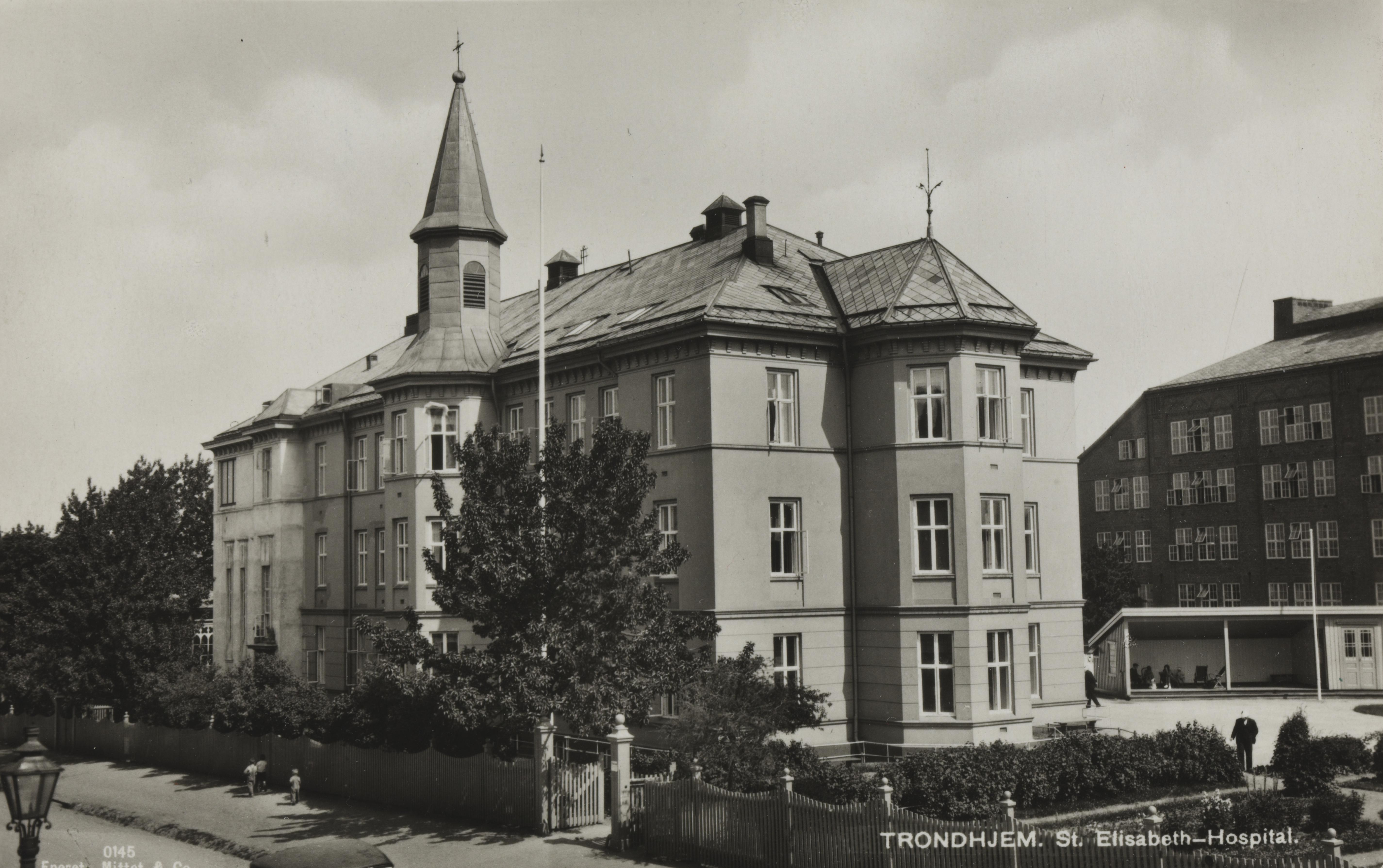 Bildet er hentet fra Nasjonalbibliotekets bildesamling Ila, Trondheim, Sør Trøndelag